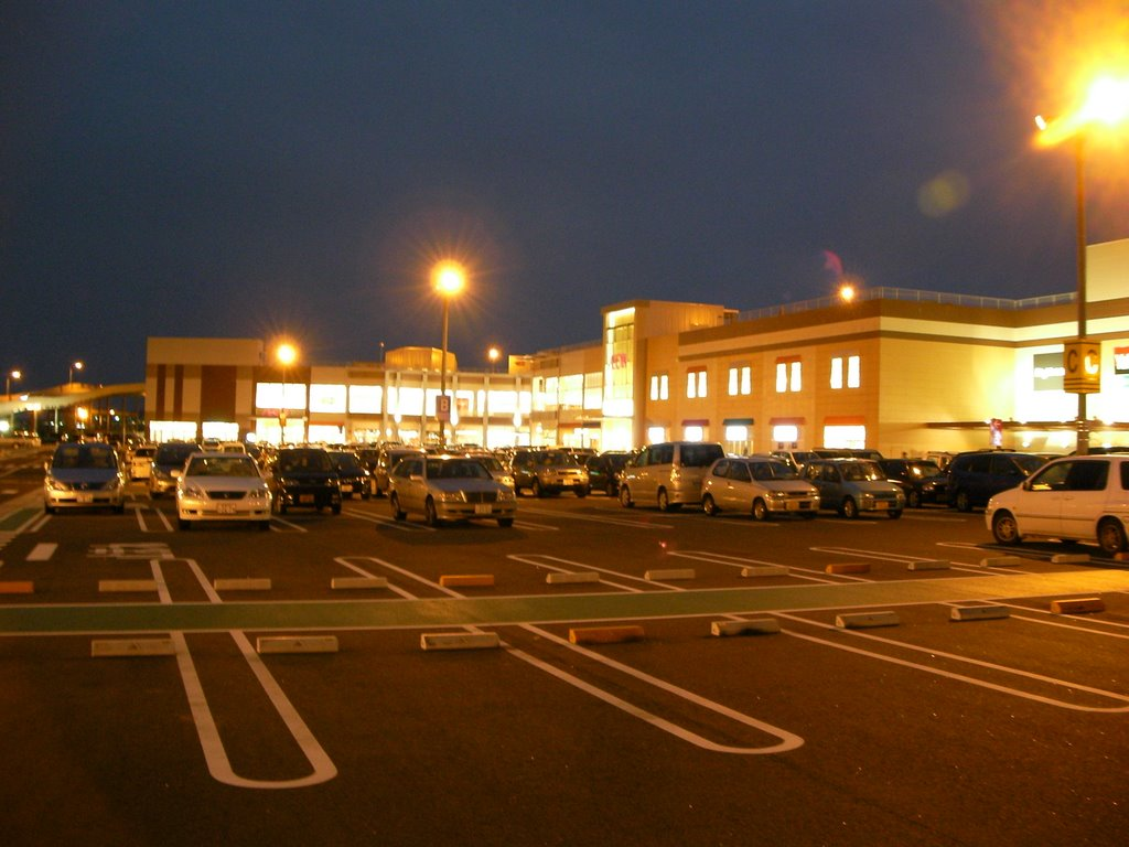 イオン仙台泉大沢SC（現・イオンタウン仙台泉大沢）